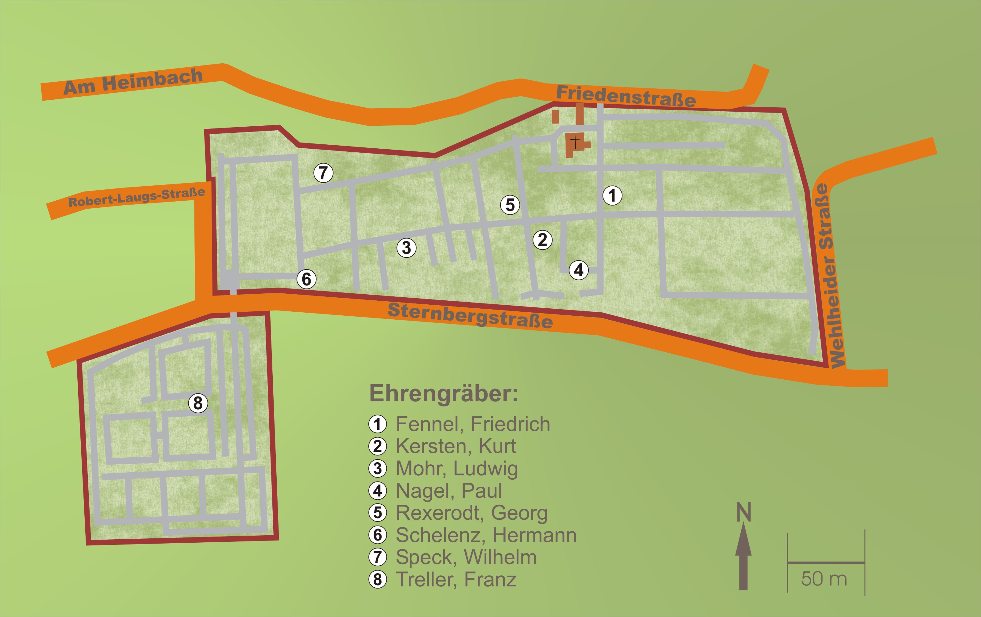 Plan des Friedhofs in Kassel-Wehlheiden (Deutschland)